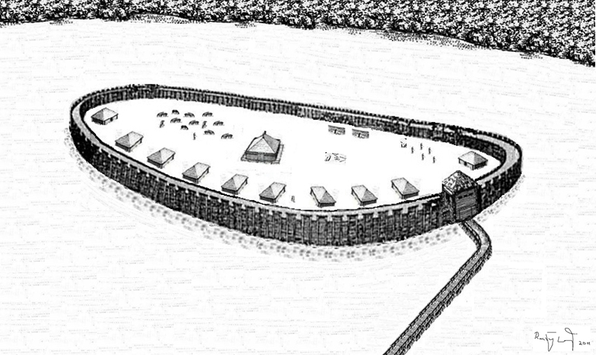 "Castrum Wustrow" um 1150, Rekonstruktionsversuch